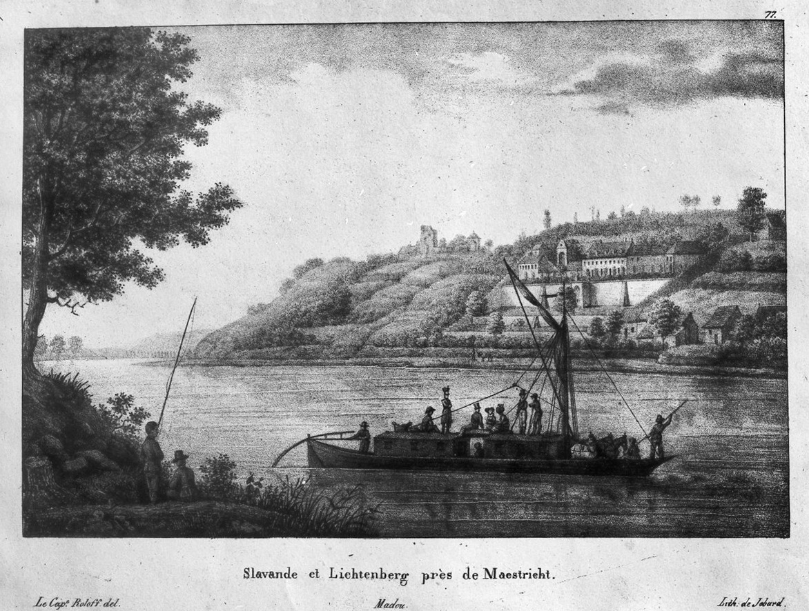 Maas en Sint Pietersberg: zicht op Slavante (Observantenklooster) en ruïne Lichtenberg, litho nr. 77 uit Voyage Pittoresque dans le Royaume des Pays-Bas (1825 ) door Jean-Joseph de Cloet. Lithografie waarschijnlijk van Jean-Baptiste Madou.